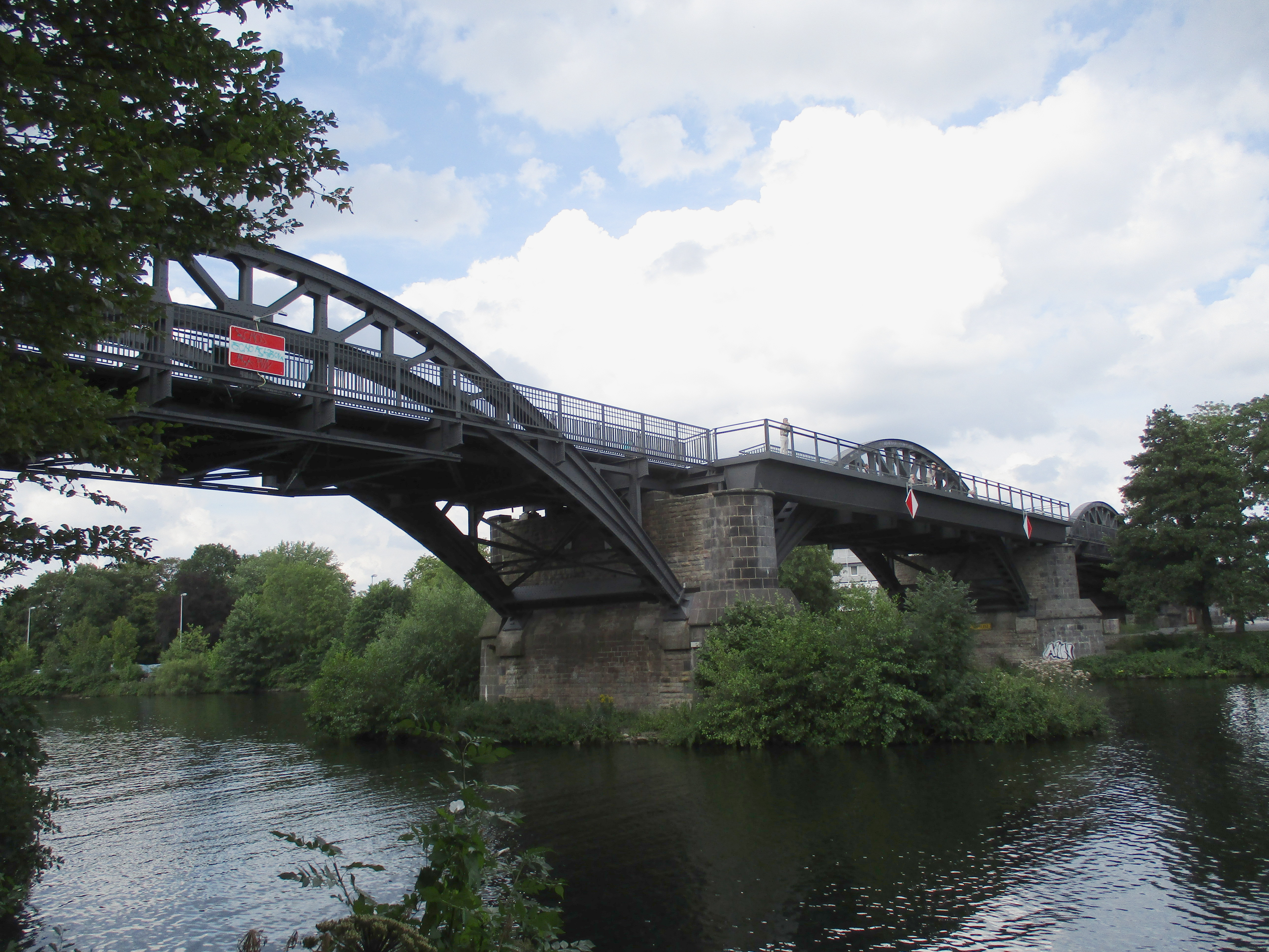 Seit dem Umbau des Stadtviadukts zum Radschnellweg RS1 hat die Alte Bahnbrücke eine Aussichtsplattform.